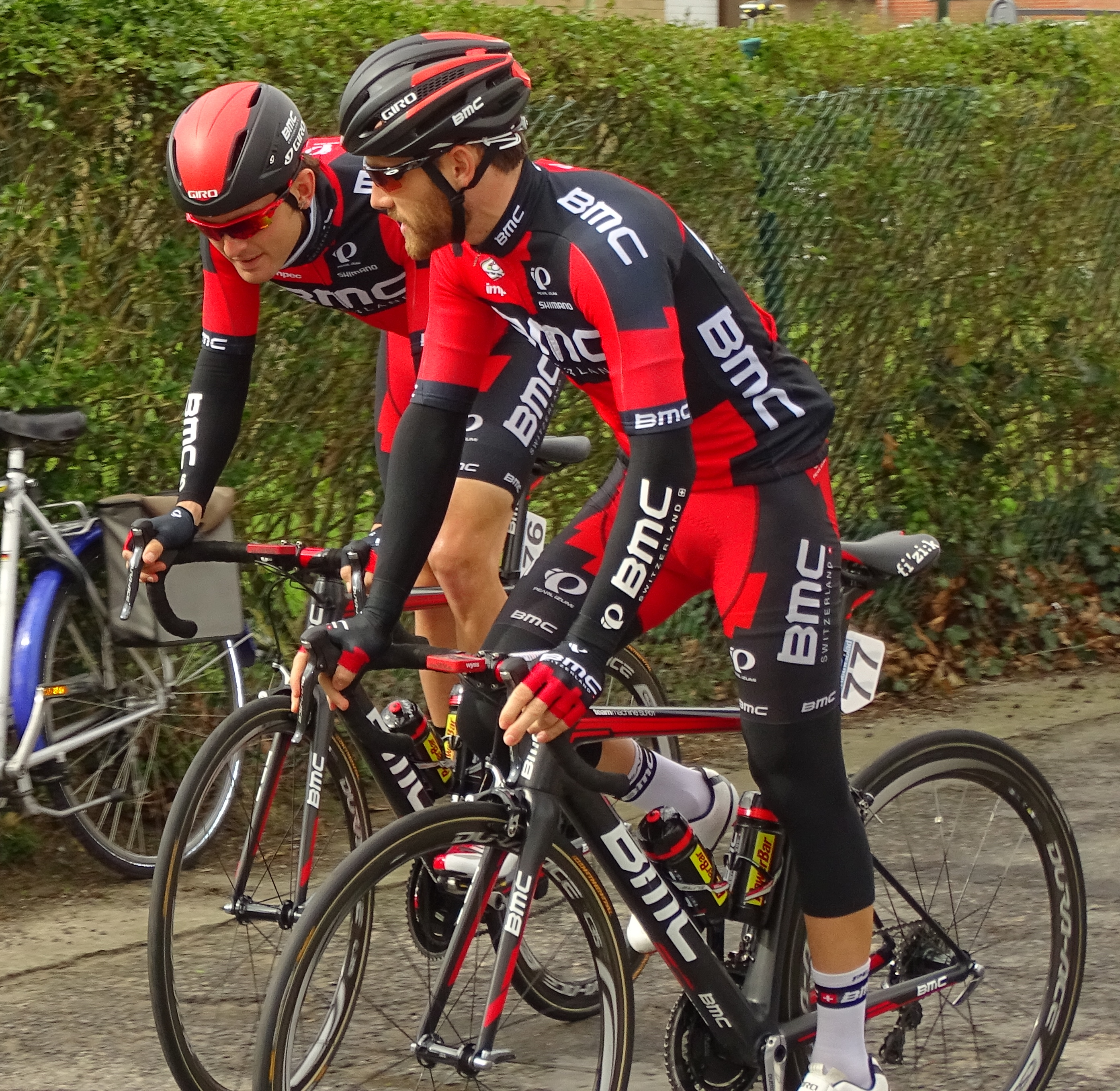 Reportage réalisé le mardi 31 mars à l'occasion de du départ de la première étape des Trois jours de La Panne 2015 à La Panne, Belgique.